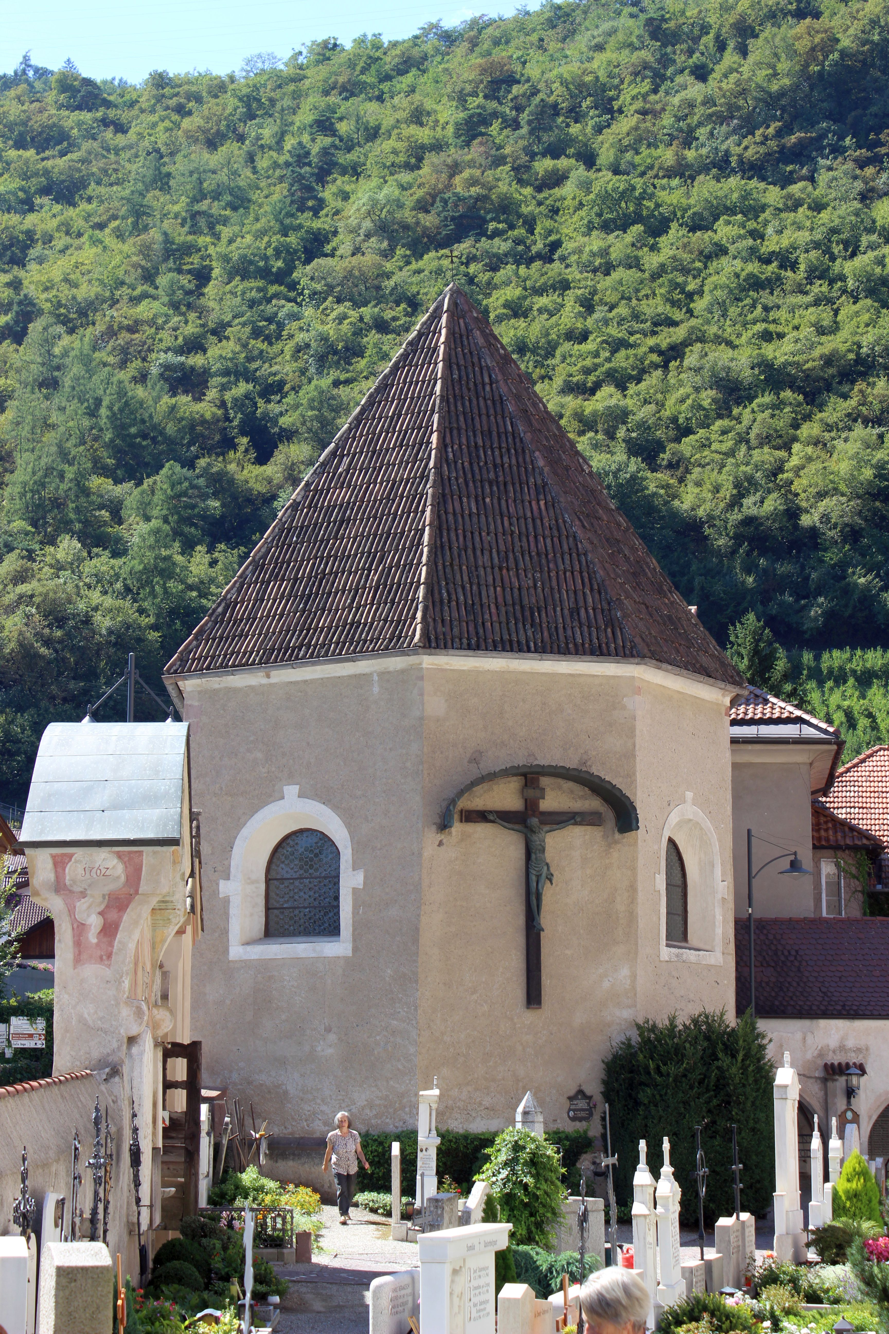 Friedhofskapelle bei der alten Pfarrkirche Mariä Himmelfahrt in Lana